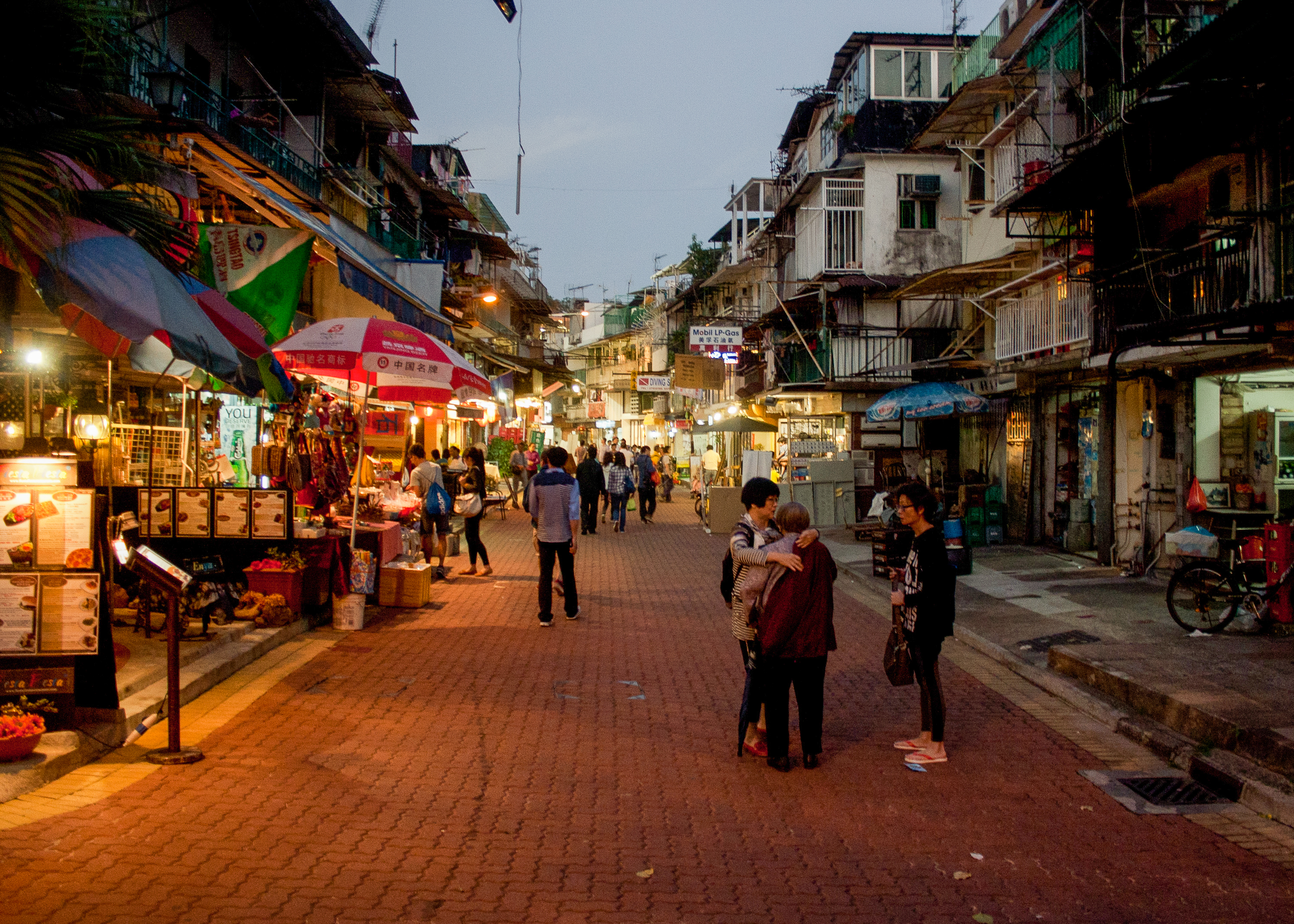 Sai Kung See Cheung Street